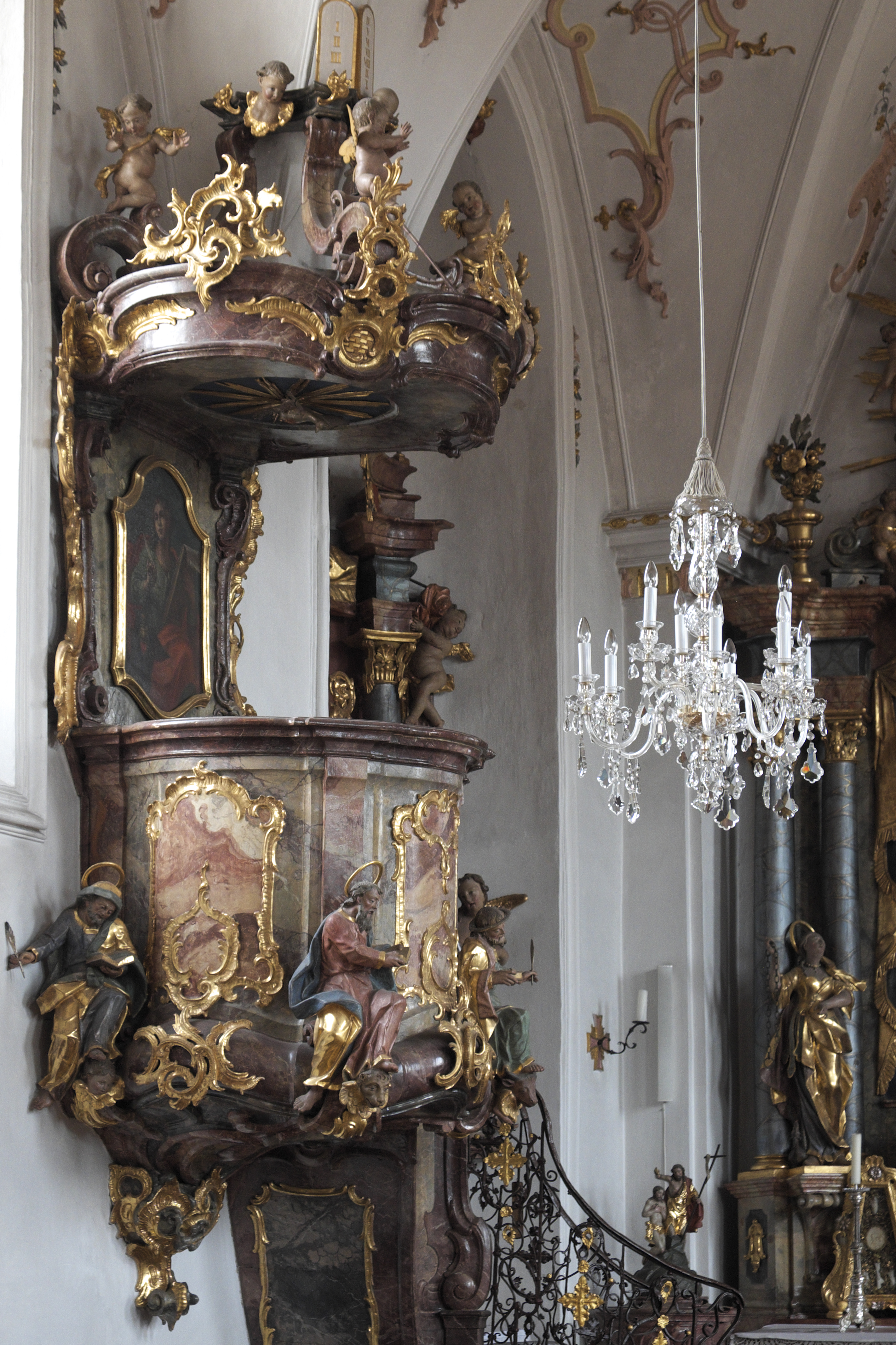 Katholische Pfarrkirche Mariä Himmelfahrt in Walleshausen, einem Ortsteil von Geltendorf im Landkreis Landsberg am Lech (Oberbayern/Bayern), Spätrokoko-Kanzel von 1774